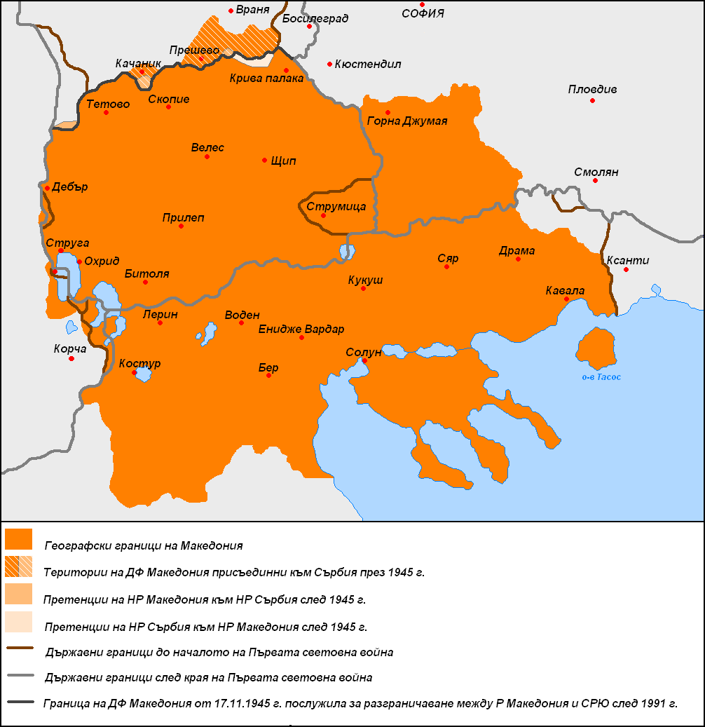 Македония и държавните граници в периода 1914-1999